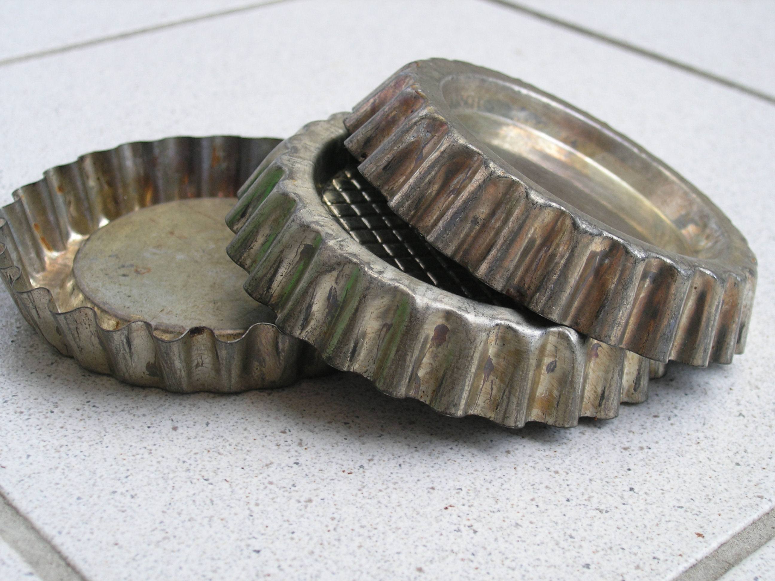 Drei Tartellette-Förmchen aus Aluminium